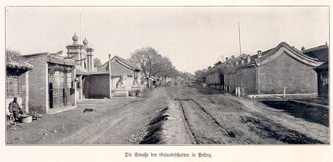 Das Gesandtschaftsviertel in Peking kurz vor dem Boxeraufstand